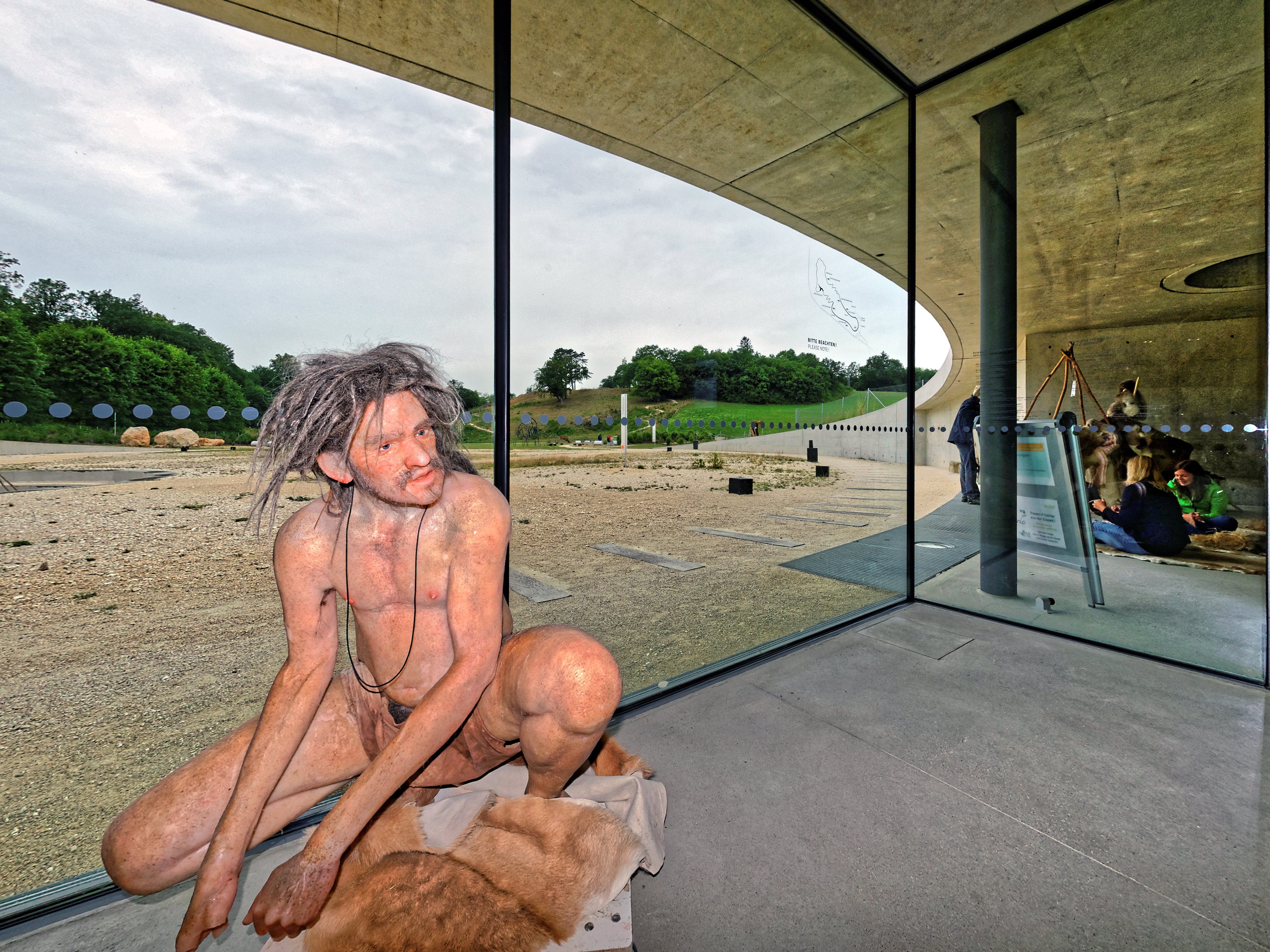 Der Archäopark Vogelherd an der Vogelherdhöhle auf der Schwäbischen Alb.